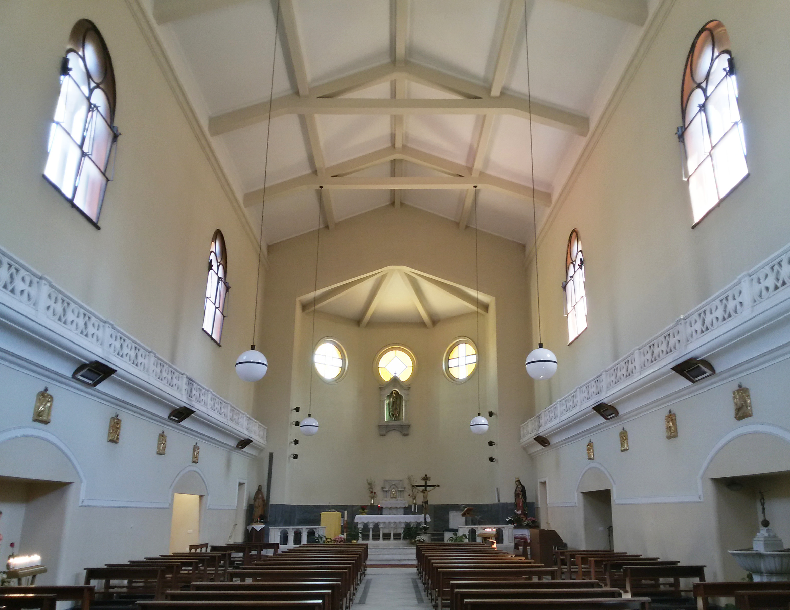 Interno verso l'abside.